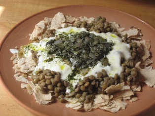 Վանա տոնածիսական կերակուր քելեկյոշ